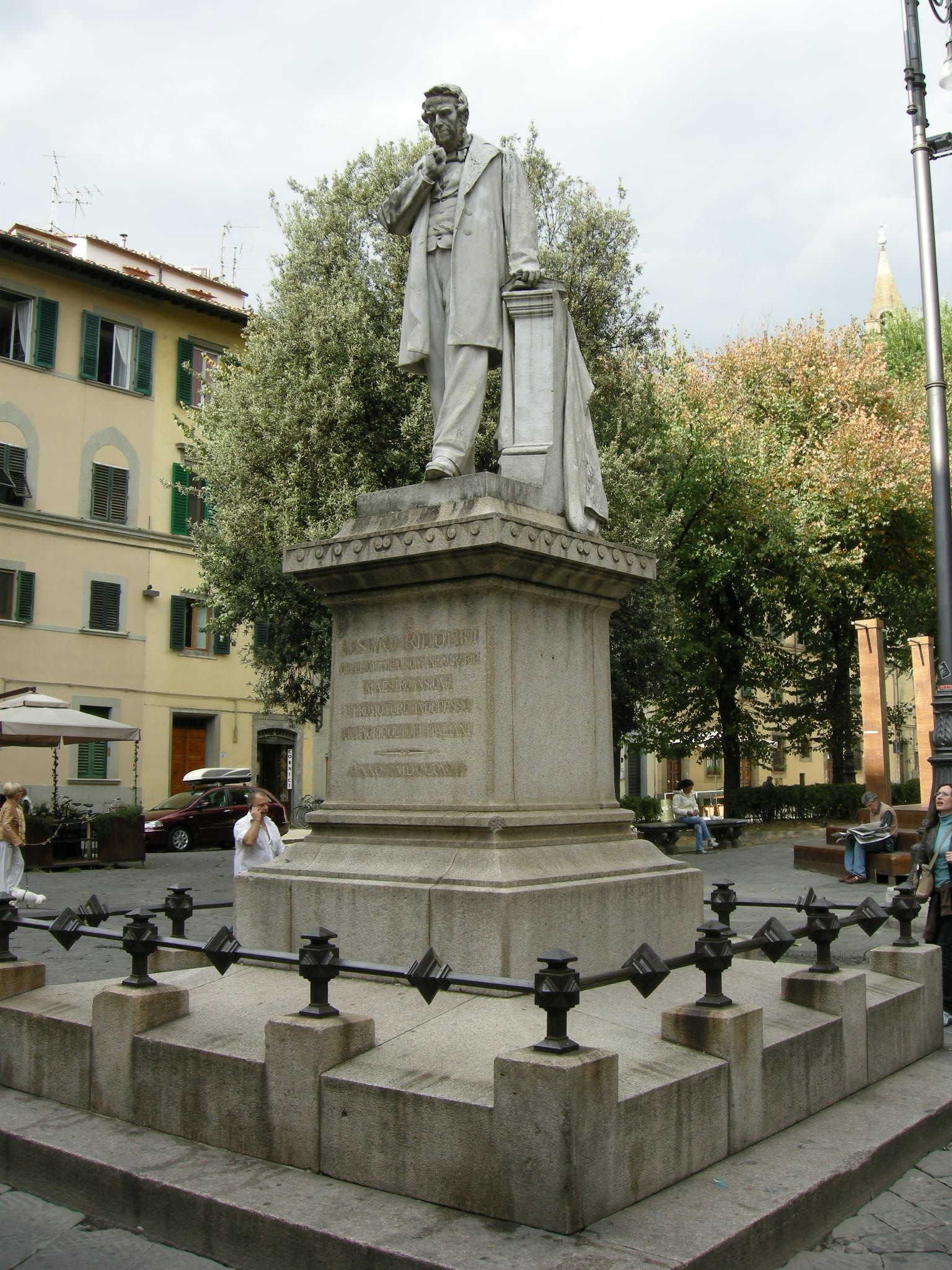 Il monumento a Cosimo Ridolfi, in Piazza Santo Spirito a Firenze, opera dello scultore Raffaello Romanelli (1856-1928).